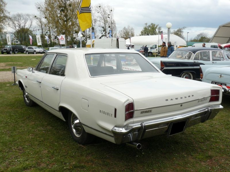 Mantes la Jolie 2012